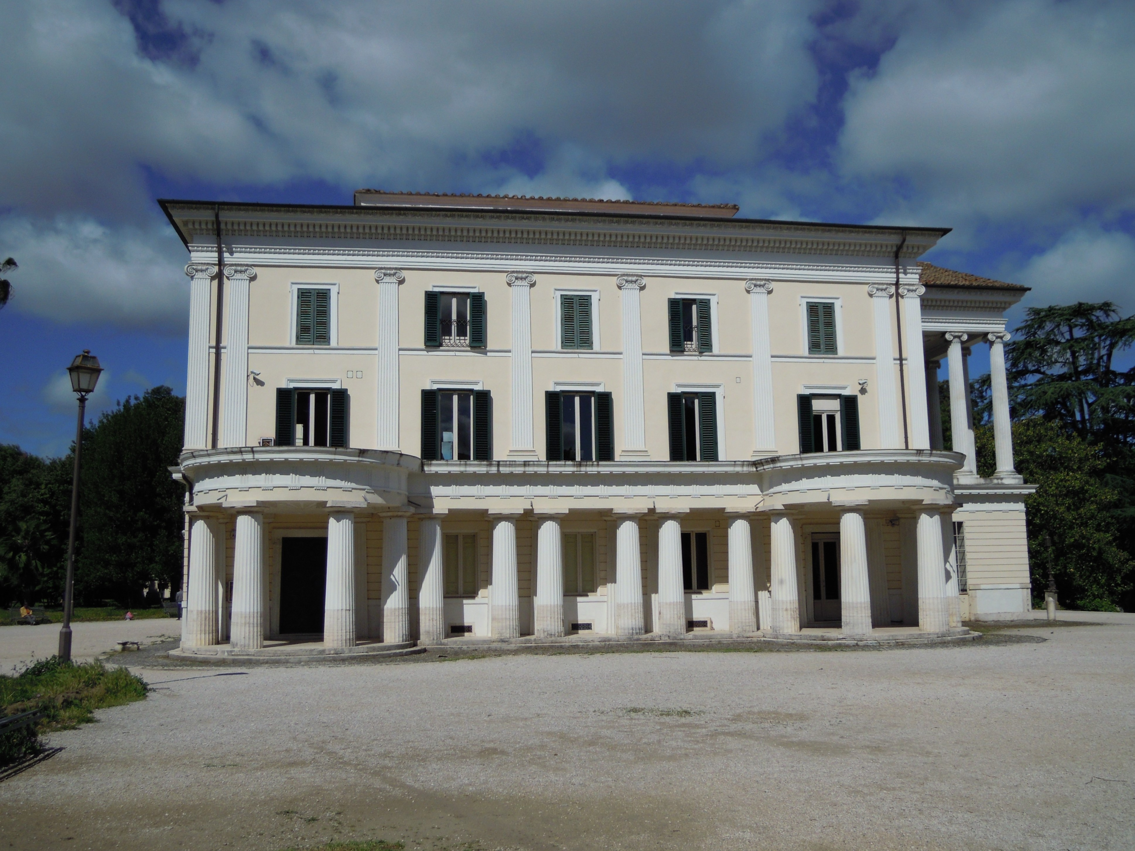 Roma, Villa Torlonia: prospetto laterale del Casino nobile con portico dorico